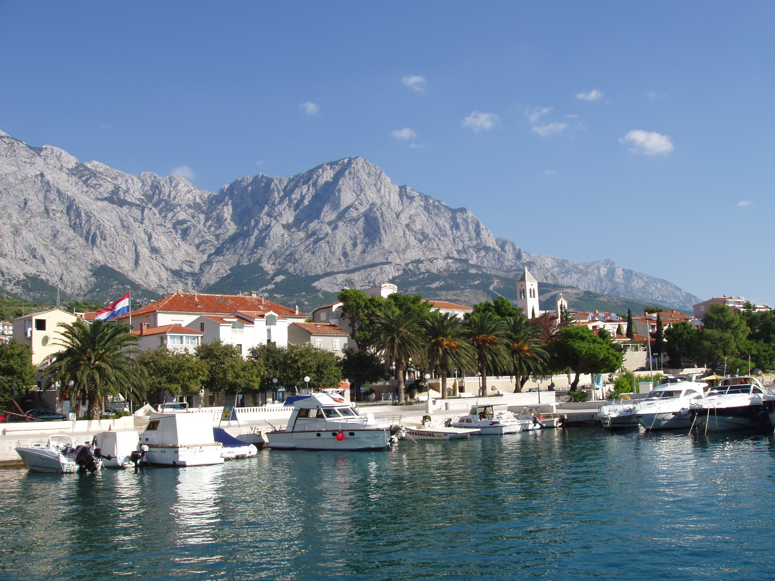 Marina in BaÅ¡ka Voda, Makarska Riviera, Kroatien; im Hintergrund das Biokovo-Gebirge